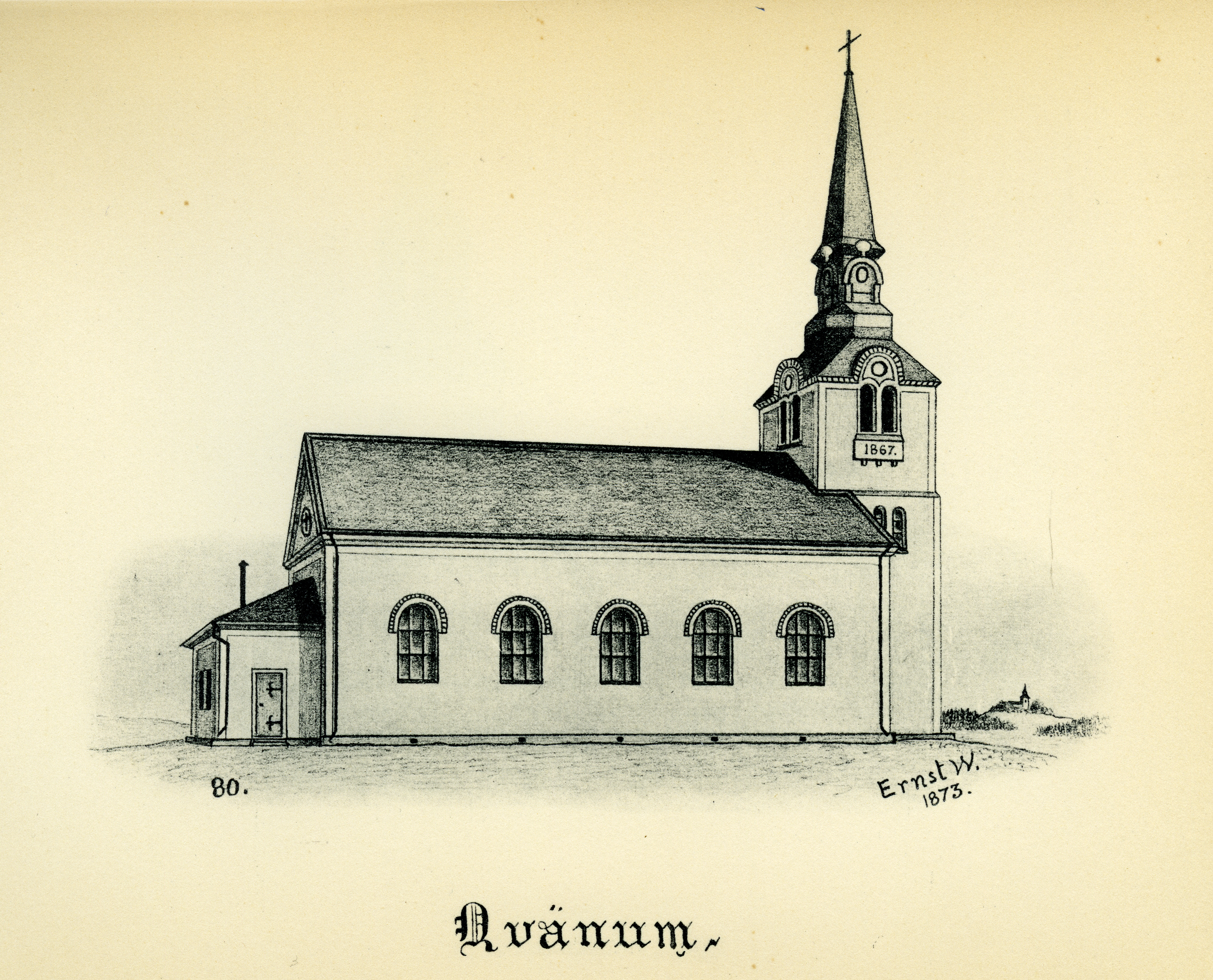 Kvänums kyrka år 1873 i Skånings härad, Skara stift, Västergötland, Sverige. Teckning av Ernst Wennerblad ur Skara stifts kyrkor (1902).